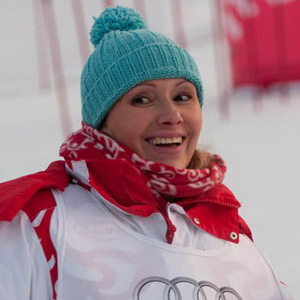 Мария Бутырская на четвёртом Кубке Audi по слалому среди звёзд 30 января 2010 года